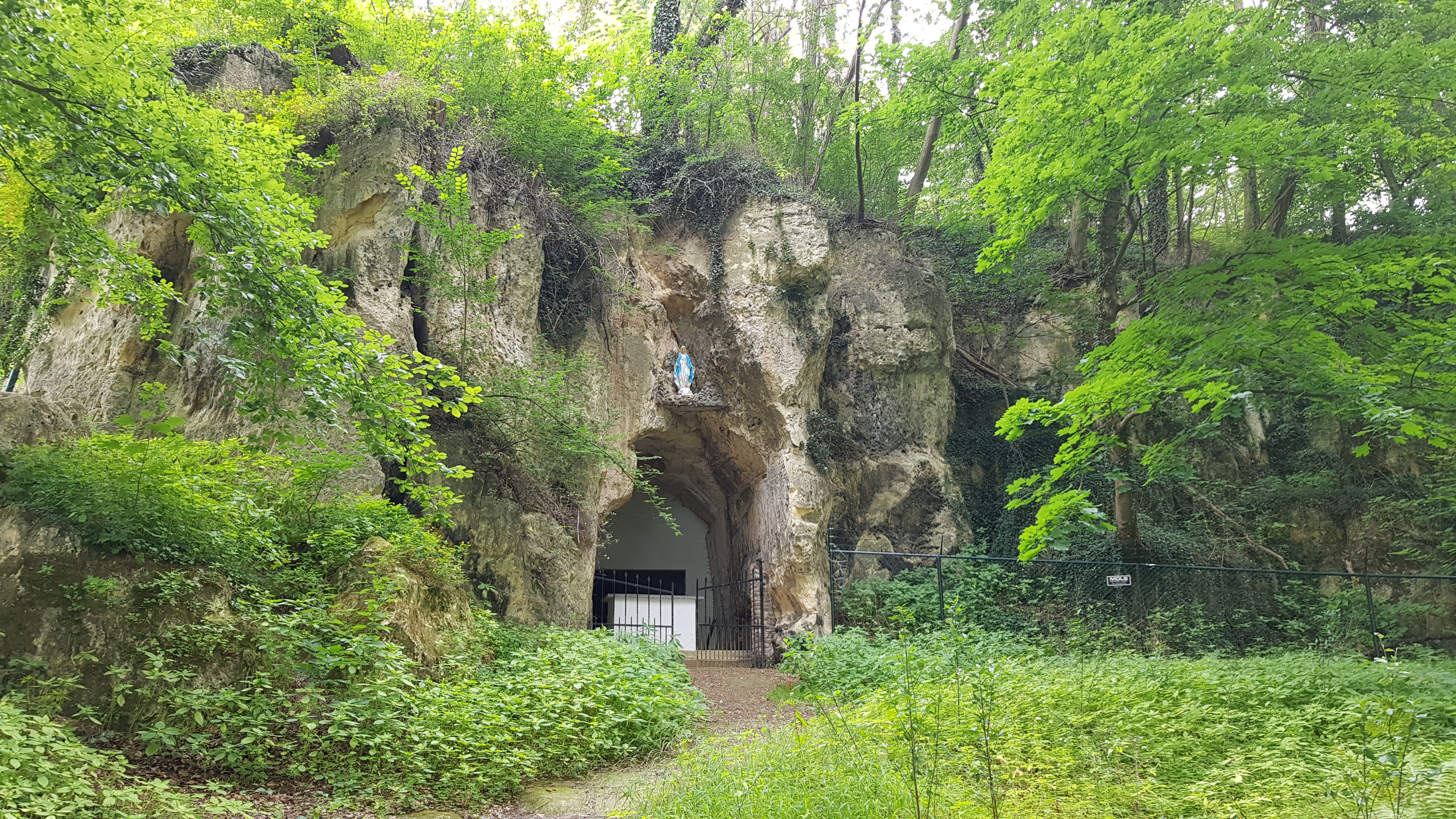 Heerderberggroeve, Cadier en Keer, Nederland